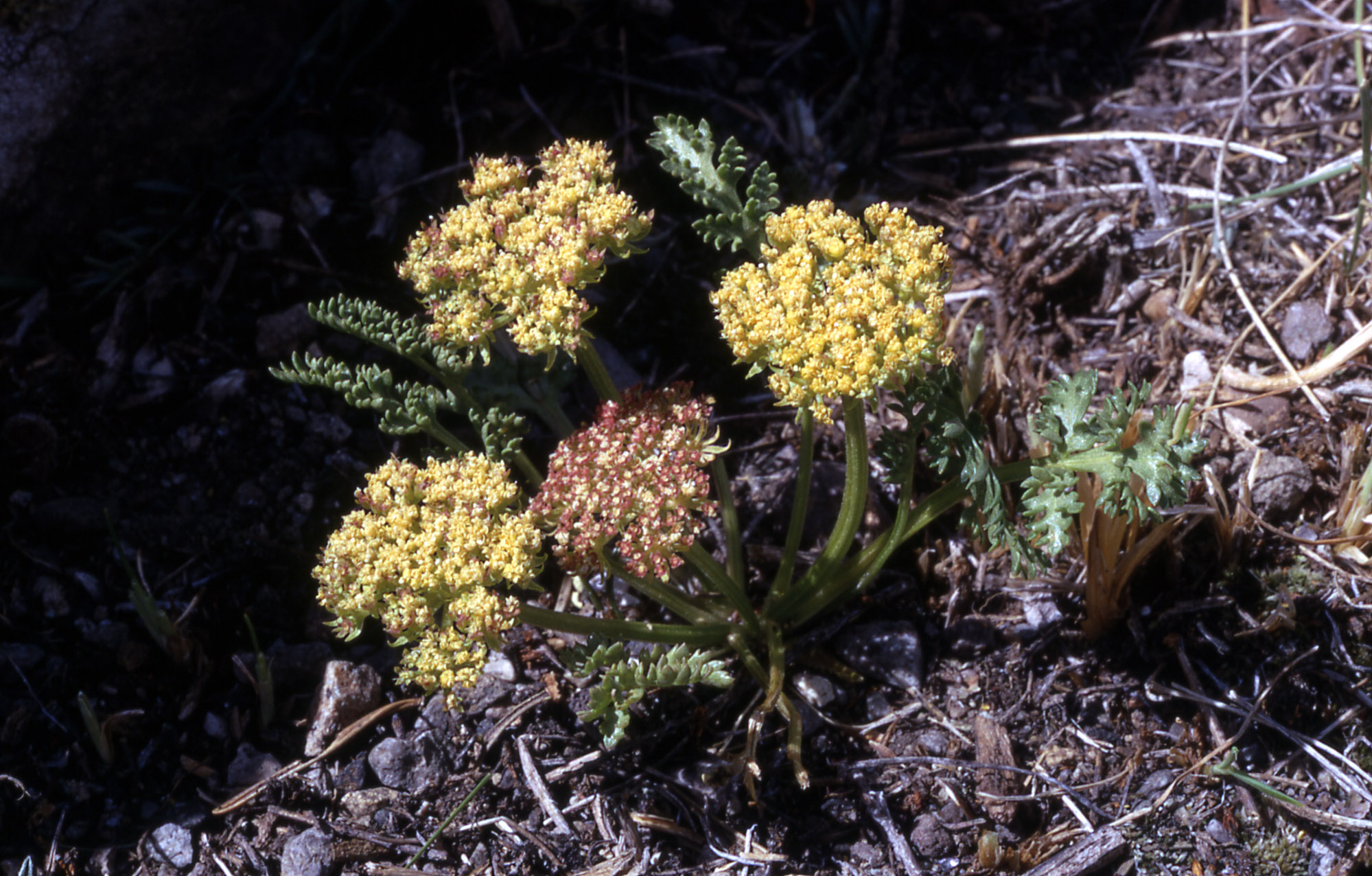 Musineon divaricatum